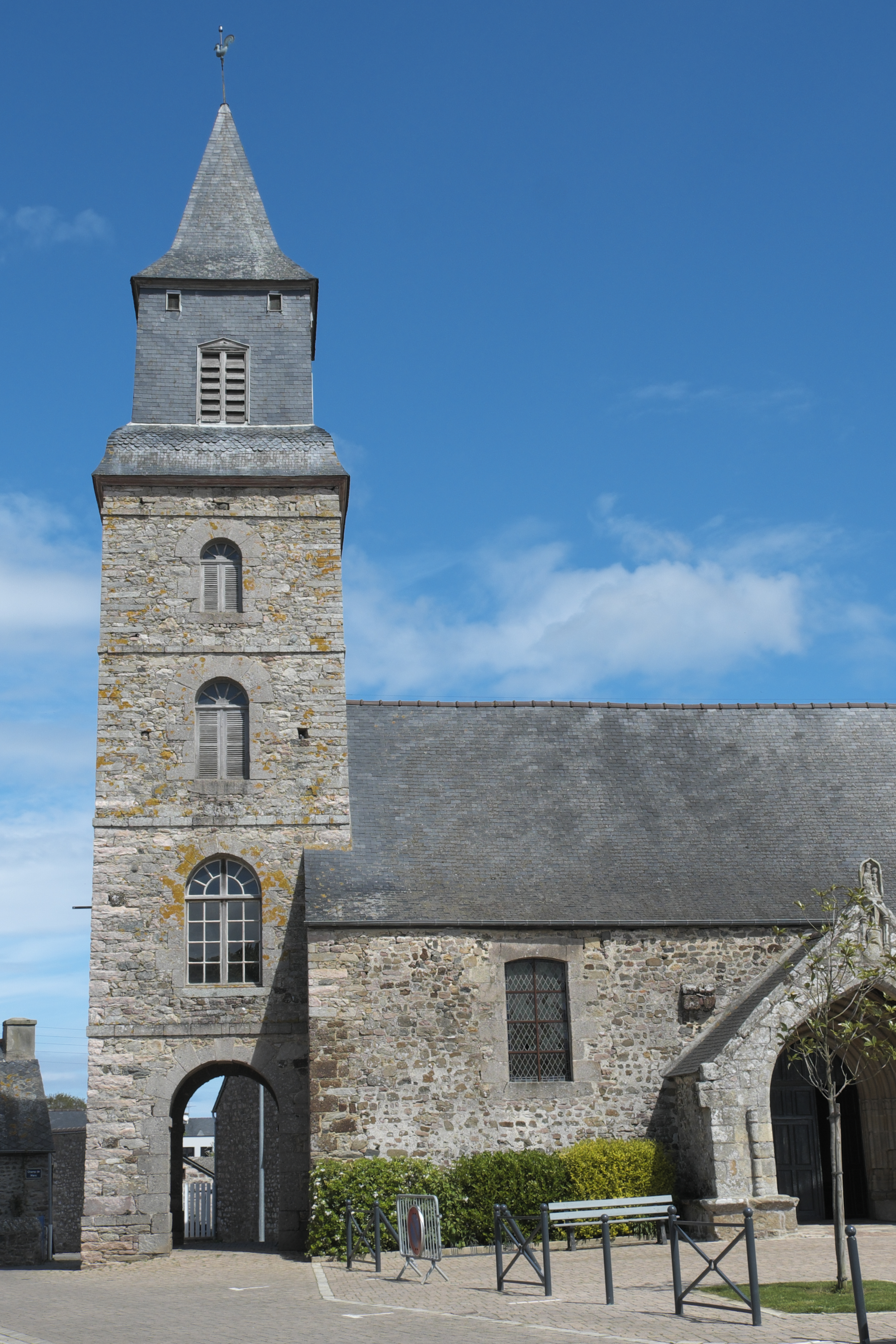 Katholische Kirche Saint-Pierre in Plurien im Département Côtes-d’Armor (Region Bretagne/Frankreich)